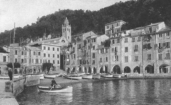 Immagine di fine Ottocento e inizio Novecento di Portofino, Liguria, Italia